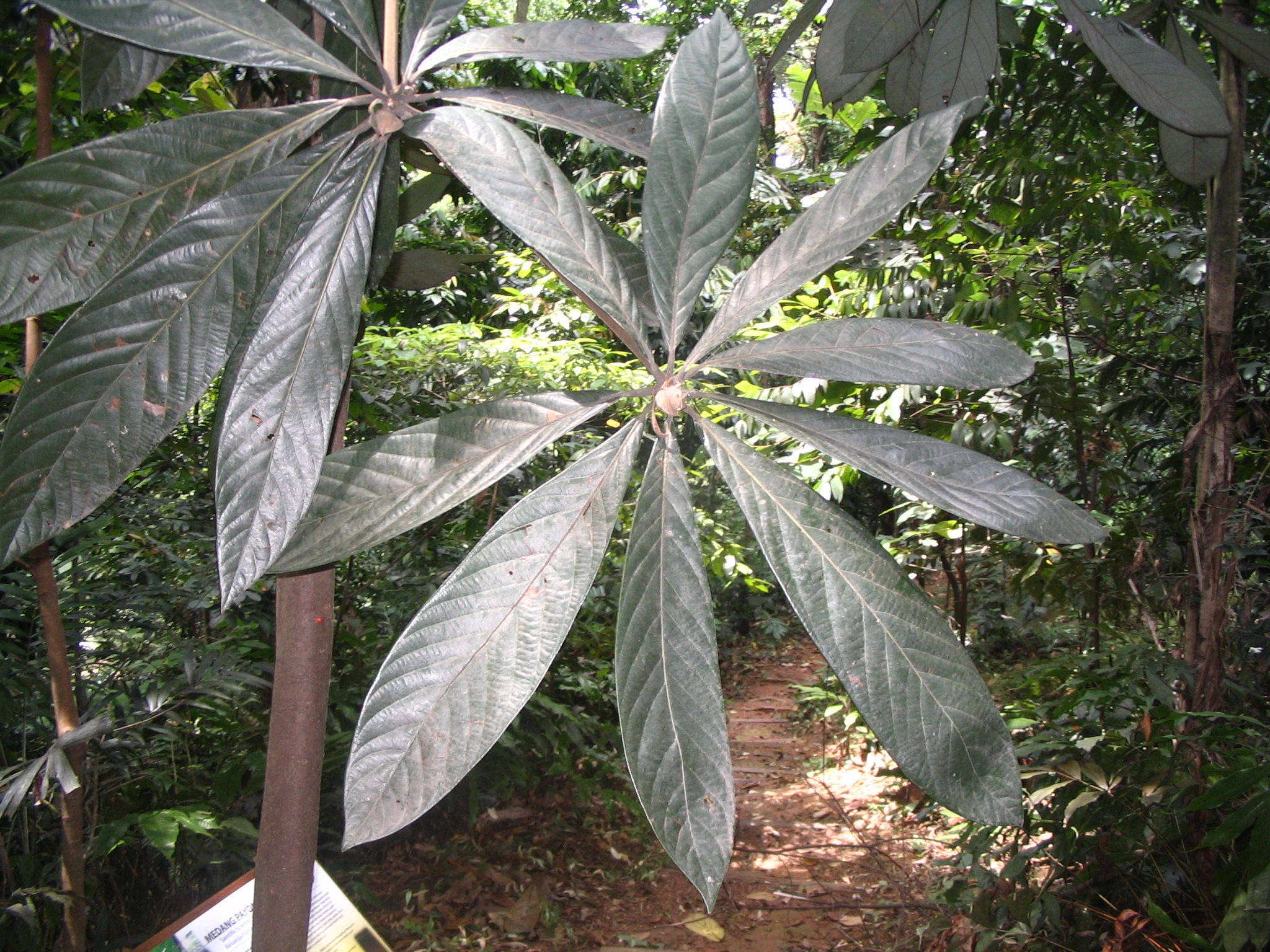 Actinodaphne malaccensis - détail des feuilles (partie supérieure) - Bukit Nanas Forest Reserve - Kuala Lumpur.